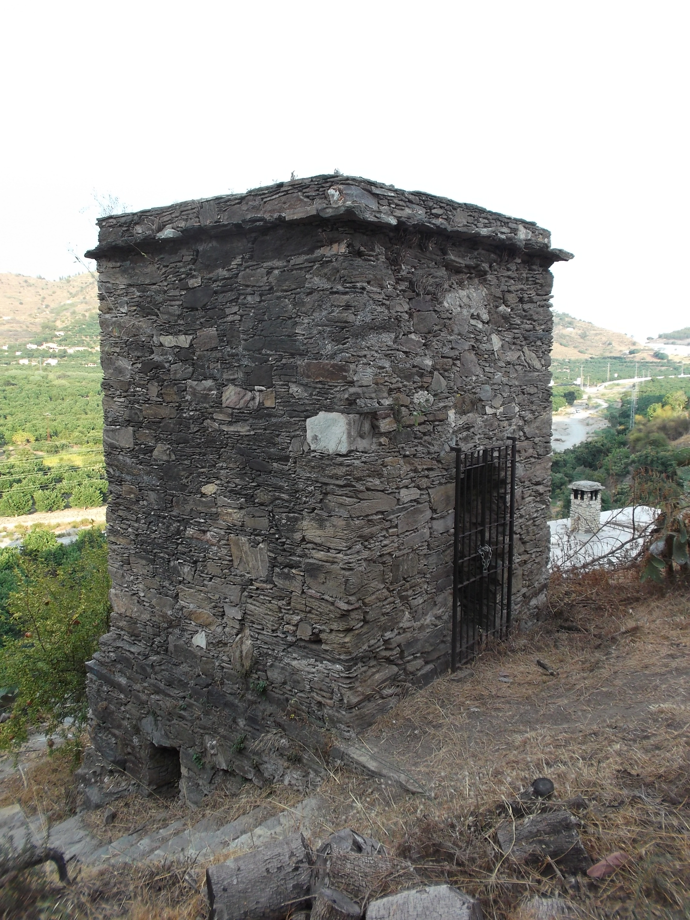 Vista de la Torre del Monje.